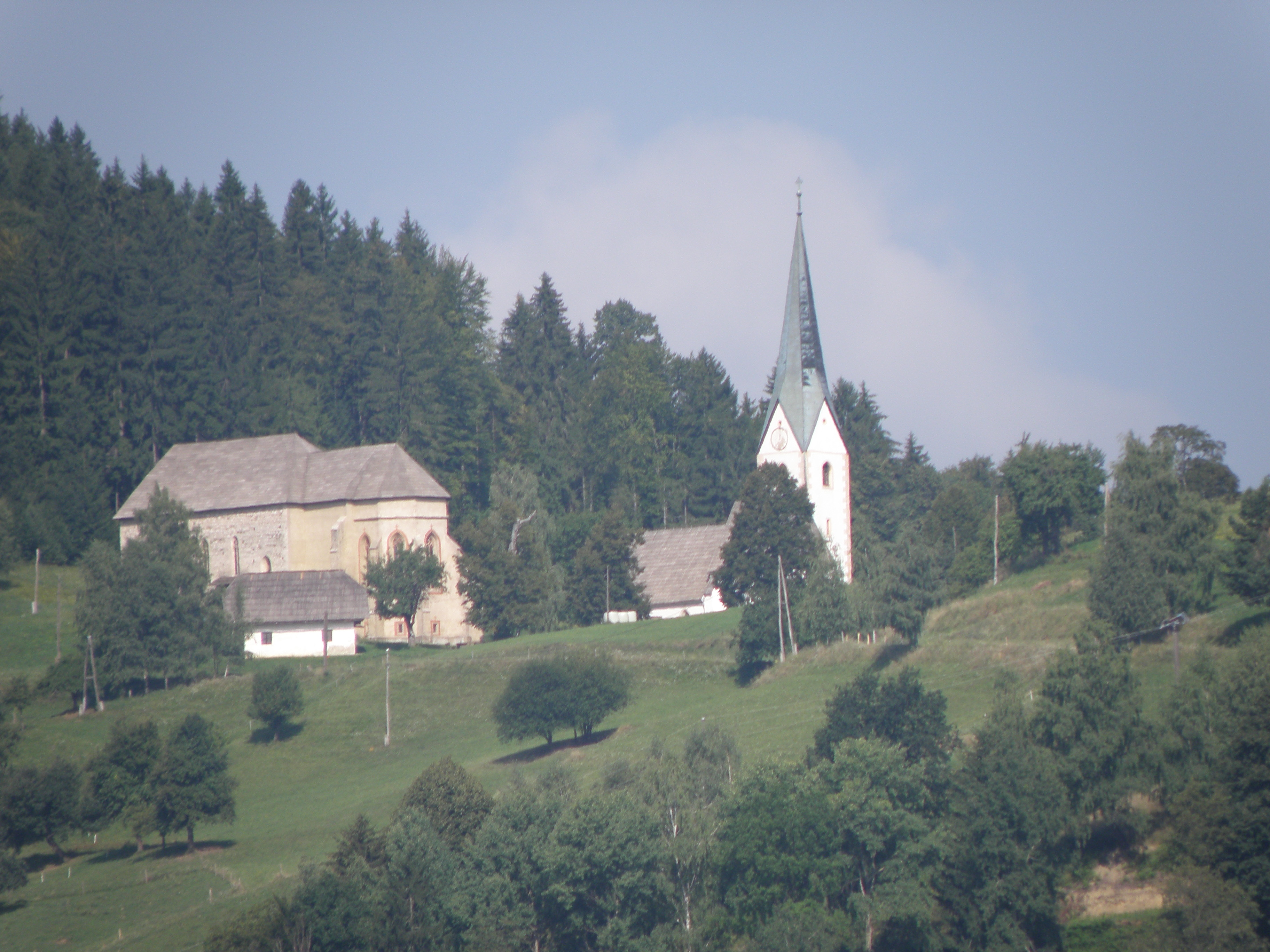 Cerkvi svete Ane in svetega Volbenka na Lešah nad Prevaljami